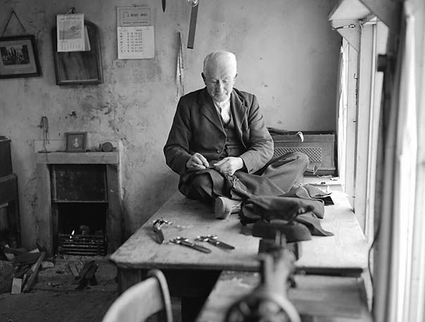 Teitl Cymraeg/Welsh title: Teiliwr wrth ei waith Ffotograffydd/Photographer: Geoff Charles (1909-2002) Dyddiad/Date: March 31, 1955. Cyfrwng/Medium: Negydd ffilm / Film negative Cyfeiriad/Reference: (gch07985) Rhif cofnod / Record no.: 3368563 Rhagor o wybodaeth am gasgliad Geoff Charles yn Llyfrgell Genedlaethol Cymru More information about the Geoff Charles Collection at the National Library of Wales